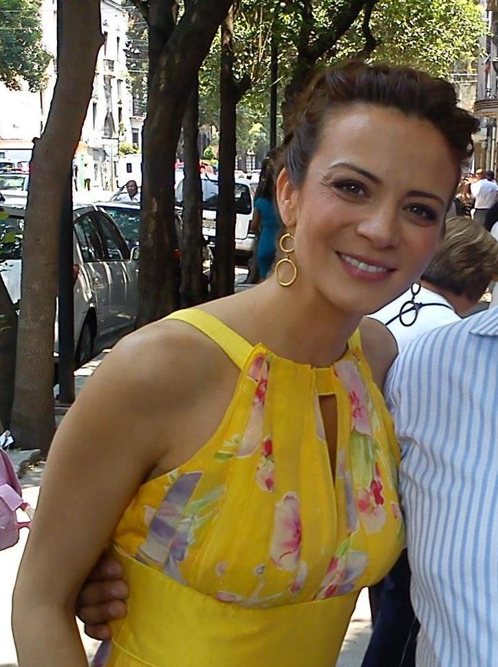 Silvia Navarro, en la Ciudad de México.